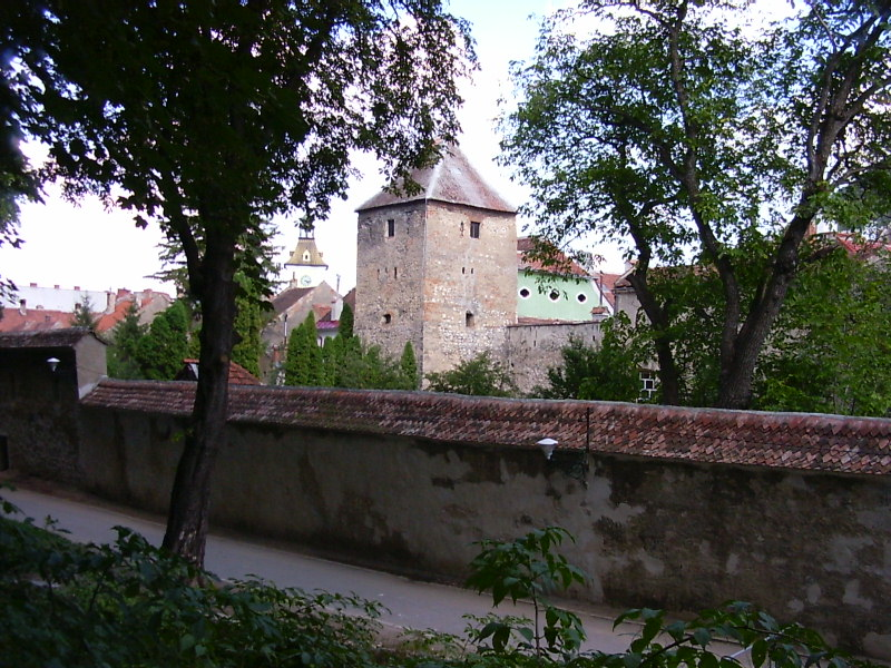 Az Ötvösök tornya Brassóban (a belvárosi, ún. görög ortodox templom hátsó frontján)